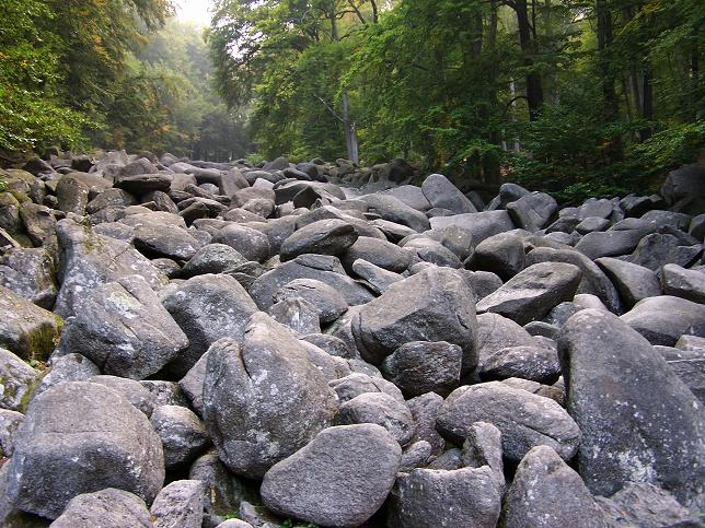 Haupt-Blockstrom des Felsenmeers im Lautertal, Oderwald